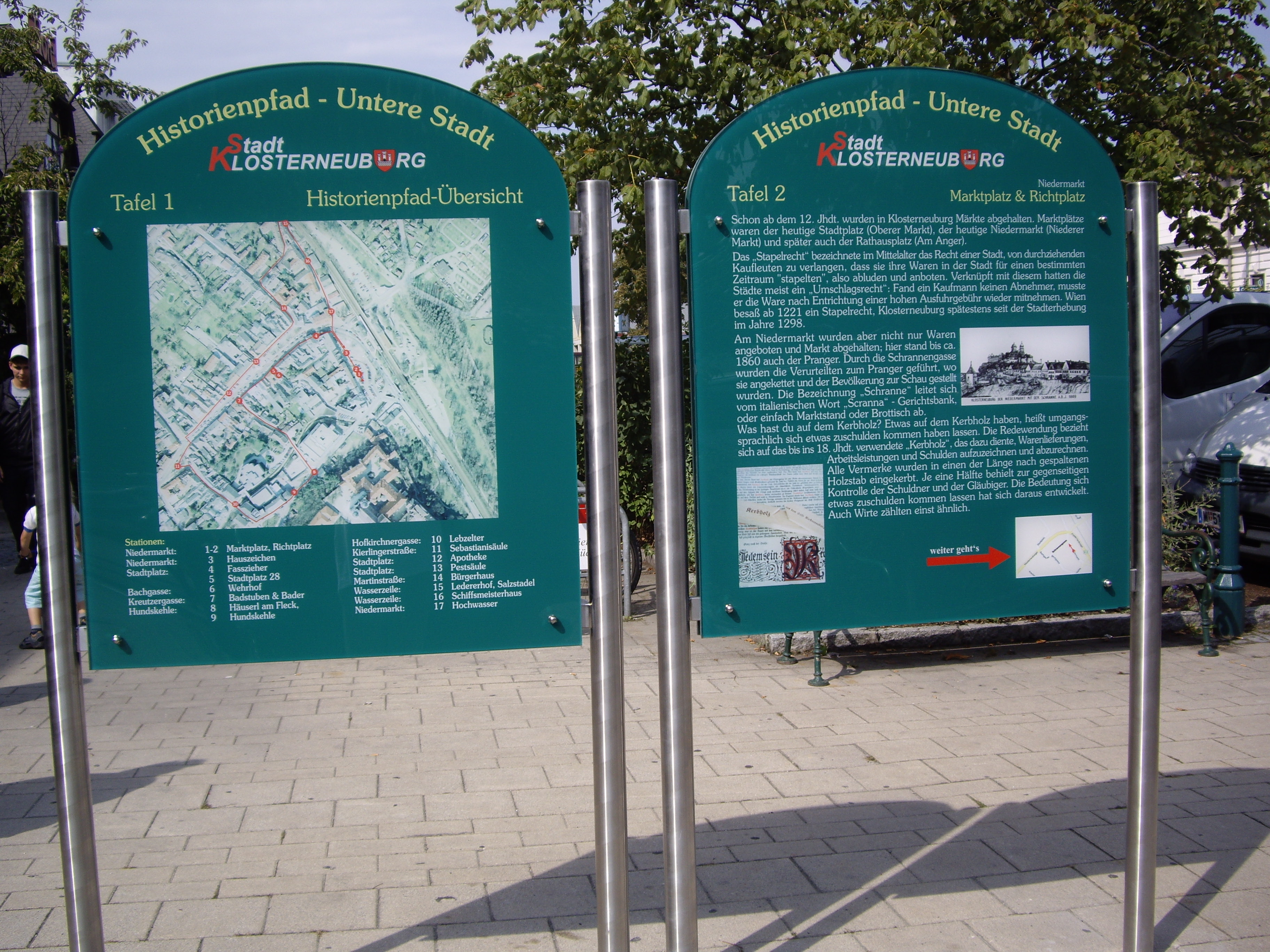 Komenciĝo de la Historiojpado en la Malsupra Urbo de Klostronovburgo Urbo.